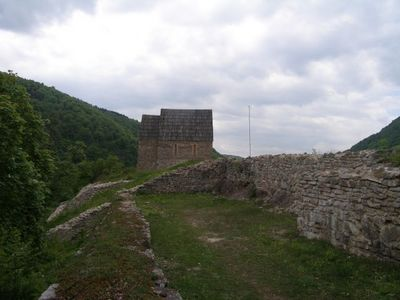 Slika Bobovca u mjesecu maju.